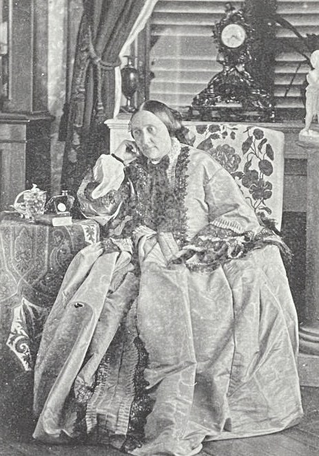 Княгиня Анна Андреевна Трубецкая, урож. Гудович (05.11.1818— 25.06.1882)